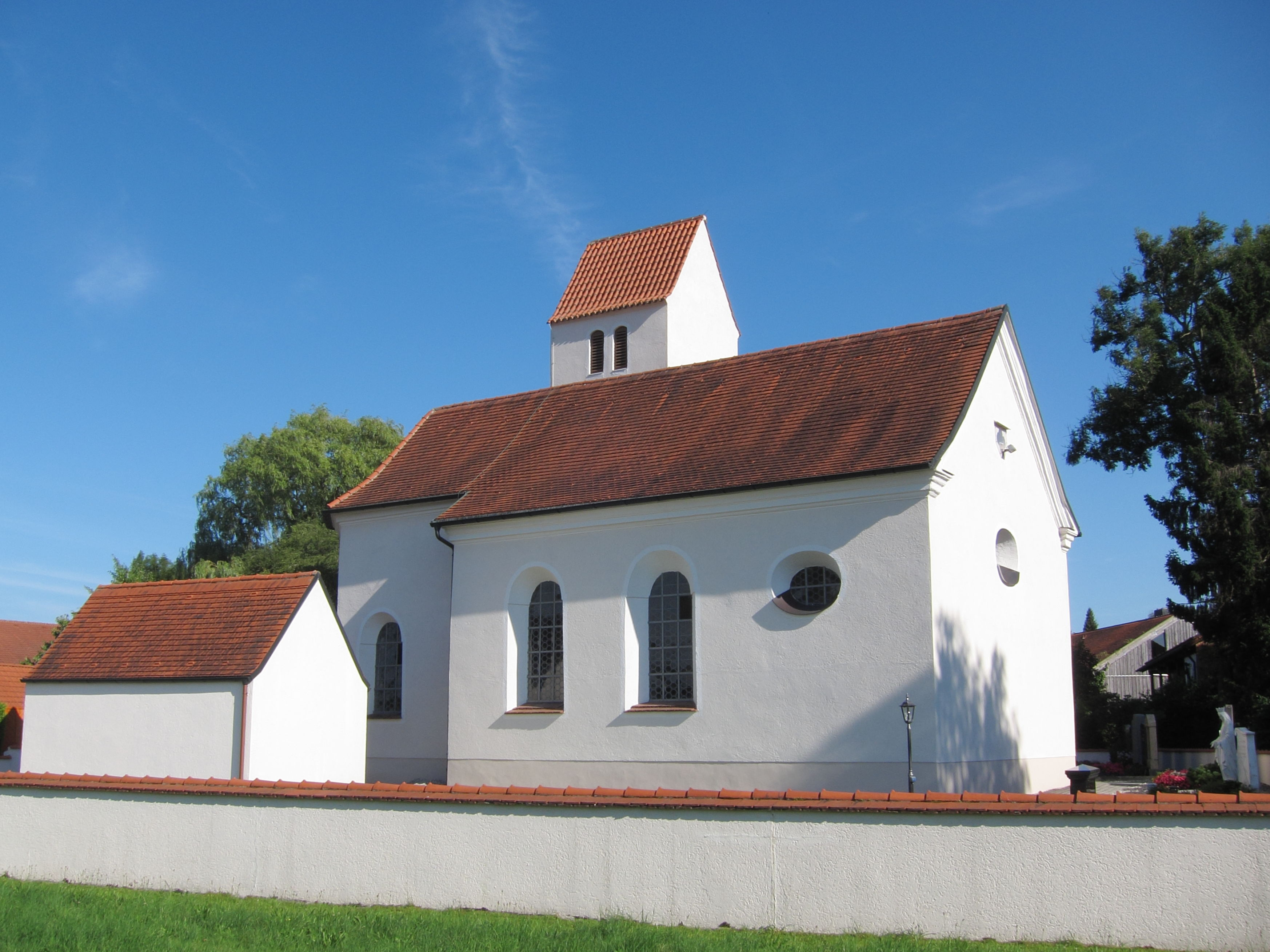 Preisendorf; kath. Filialkirche St. Stephan, Saalbau mit eingezogenem Chorabschluss und breitem Satteldachturm, 2. Hälfte 15. Jh., barockisiert; mit Ausstattung